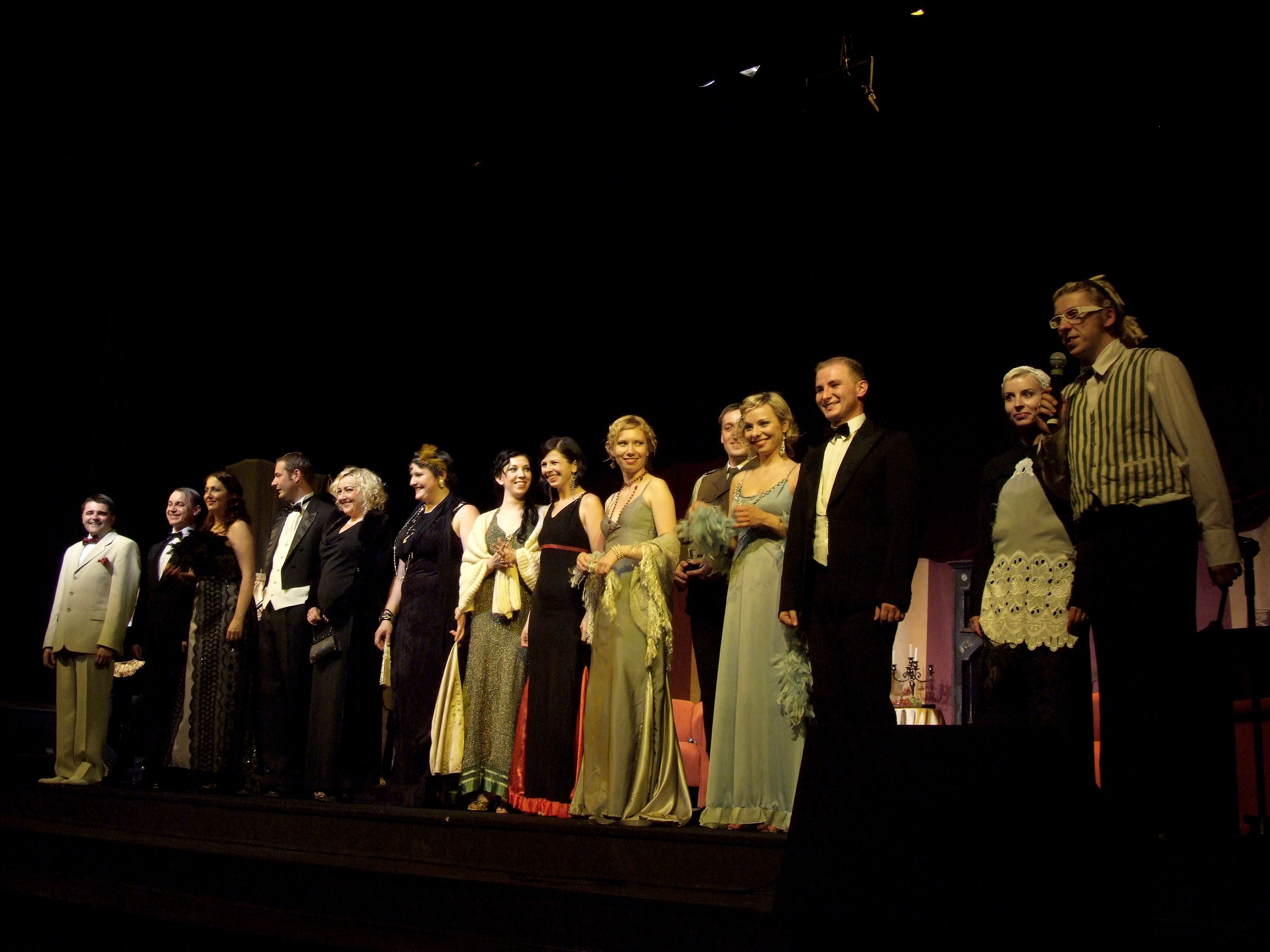 Członkowie kabaretów Zielonogórskiego Zagłębia Kabaretowego na przedstawieniu "Powróćmy jak za dawnych lat". Czerwiec 2008. Od lewej: Janusz Rewers, Wojciech Kamiński, Katarzyna Piasecka, Tomasz Marciniak, Agnieszka Litwin, , Adrianna Borek, , Ewa Stasiewicz, Kamil Piróg, , Tomasz Łupak, Magda Mleczak, Jarek Sobański.